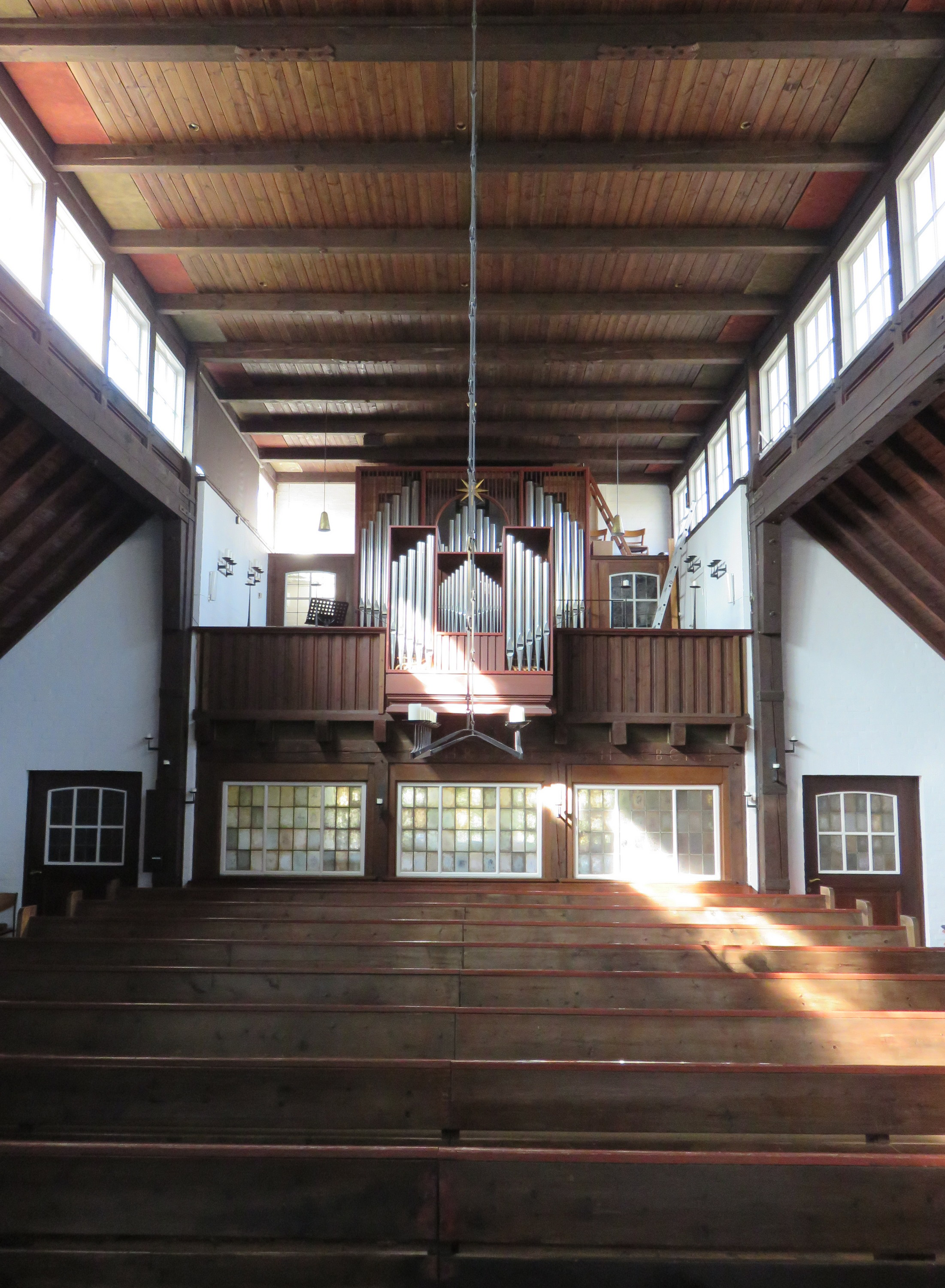 Christophorus-Kirche Poppenbüttler Stieg 25 in Hamburg-Hummelsbüttel, Innenraum mit Blick auf Orgel This is a photograph of an architectural monument.